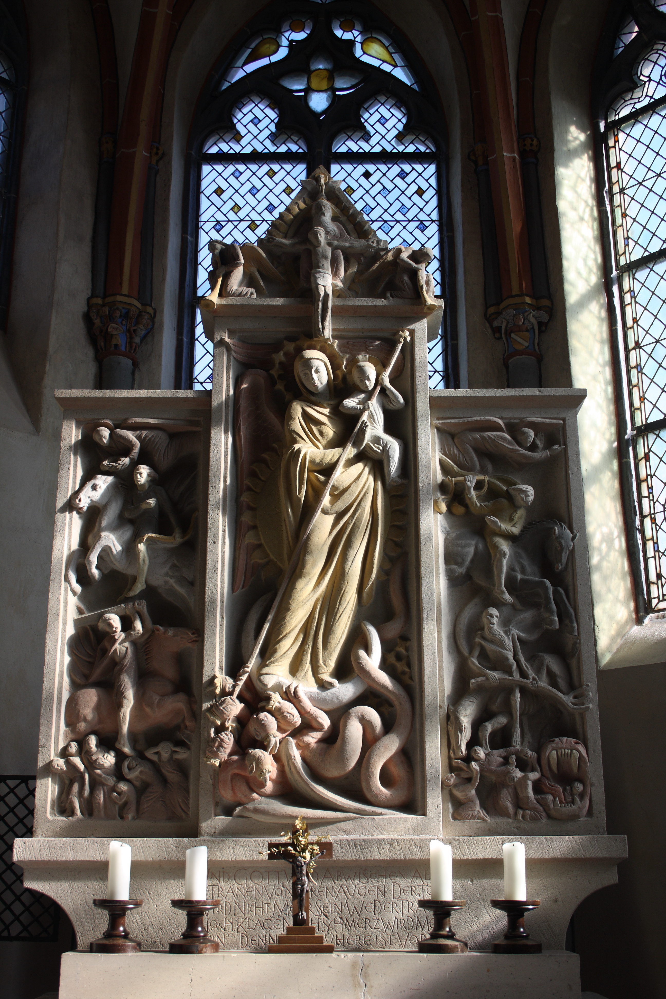 Alte Kirche in Welling, Altar